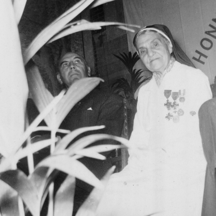 Marie Louise Gheerbrant lors de la cérémonie de remise de la Légion d'honneur, en Août 1957